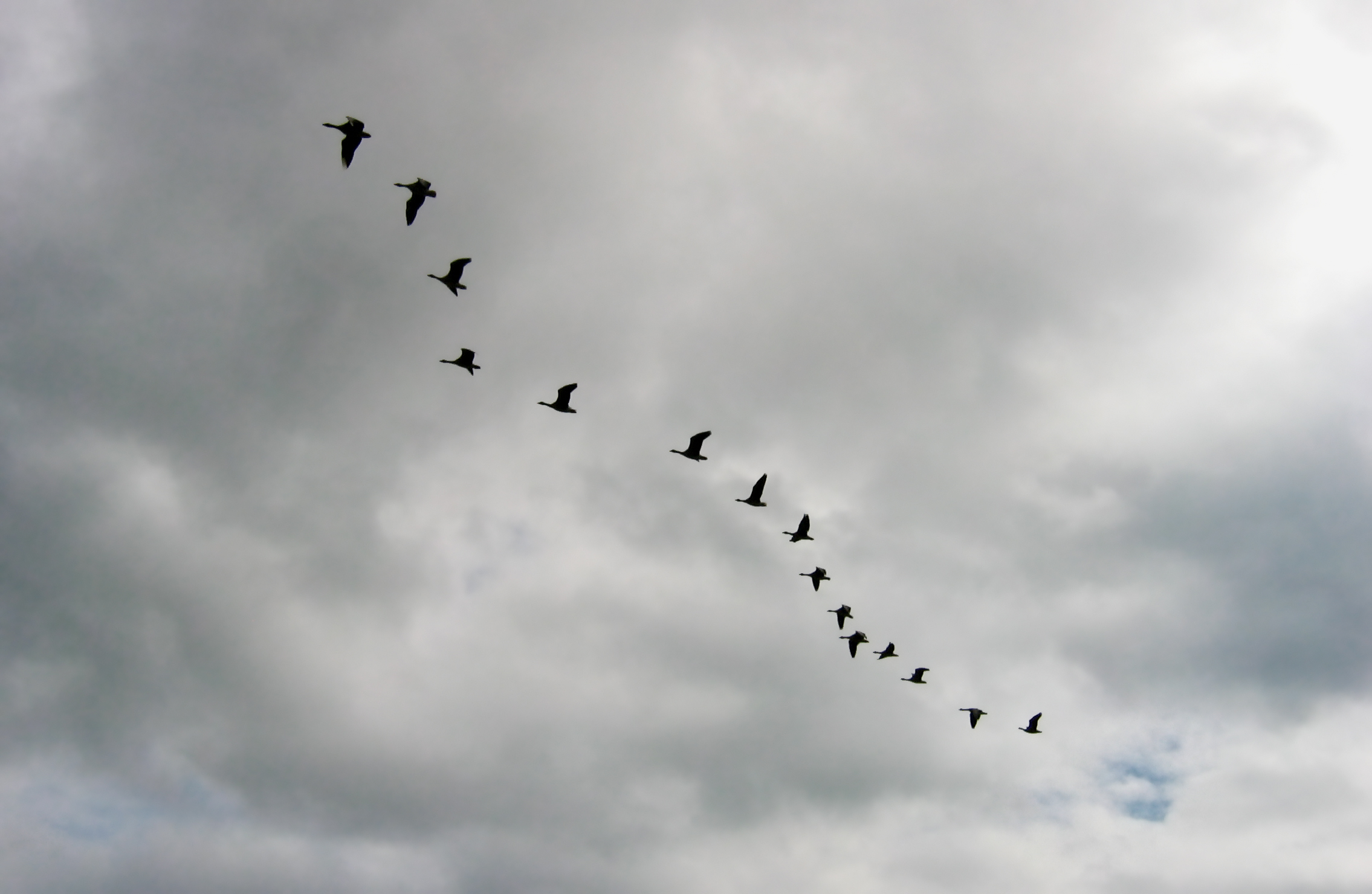 Wildgänse im Flug, A skein of greylag geese.